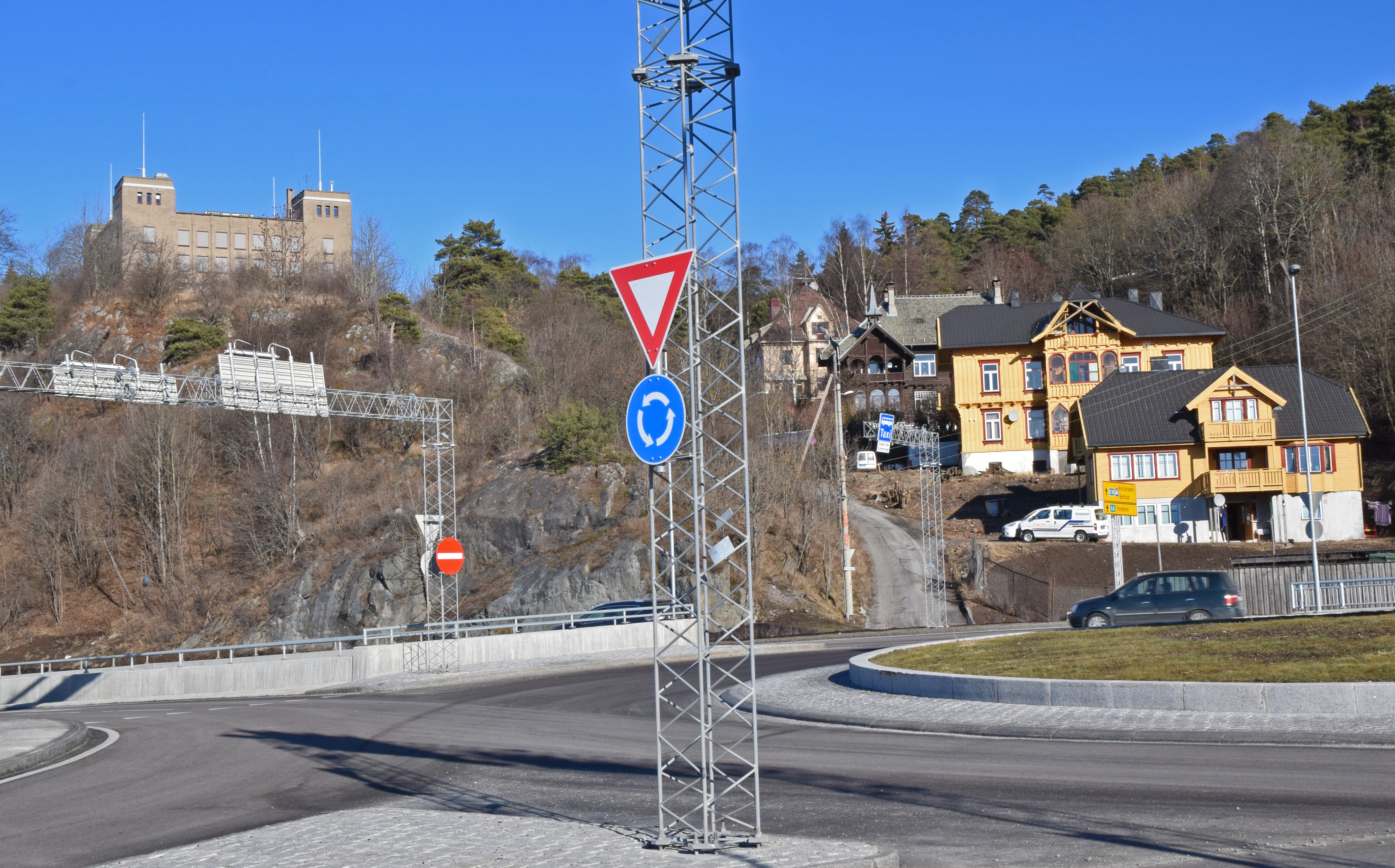 Karlsborgveien, Kongshavn, Oslo, sett fra avkjøringen til Sydhavna. Sjømannsskolen oppe til venstre.